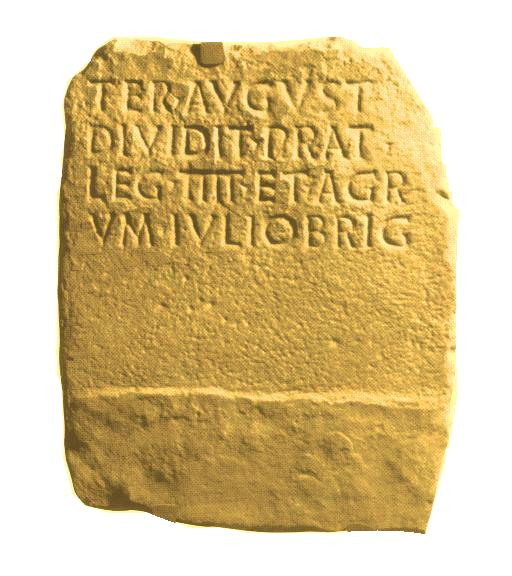 Término augustal encontrado en el municipio de Mataporquera (Cantabria). Fijaba el límite entre el territorio dependiente de la ciudad romana de Julióbriga, sujeto a tributación, y los pastos adscritos a la Legio IIII Macedonica, libres de tributos por su carácter militar. Corresponde a la inscripción EE VIII, 02, p. 507 y la ERCantabri 17, y su texto dice: -----/ TER(minus) AVGVST(alis)/ DIVIDIT· PRAT(a)/ LEG(ionis) IIII (macedonicae)· ET· AGR/VM/ IVLIOBRIGENSIVM. Actualmente esta custodiado en el Castillo de Ampudia (Palencia)